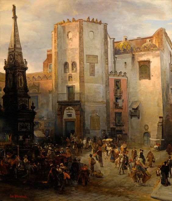 Oswald Achenbach (1827-1905): Neapel, Piazza San Domenico Maggiore in Neapel mit regem Treiben. (See below: other versions).Signiert. Öl/Lwd./Holz, 130 x 110 cm